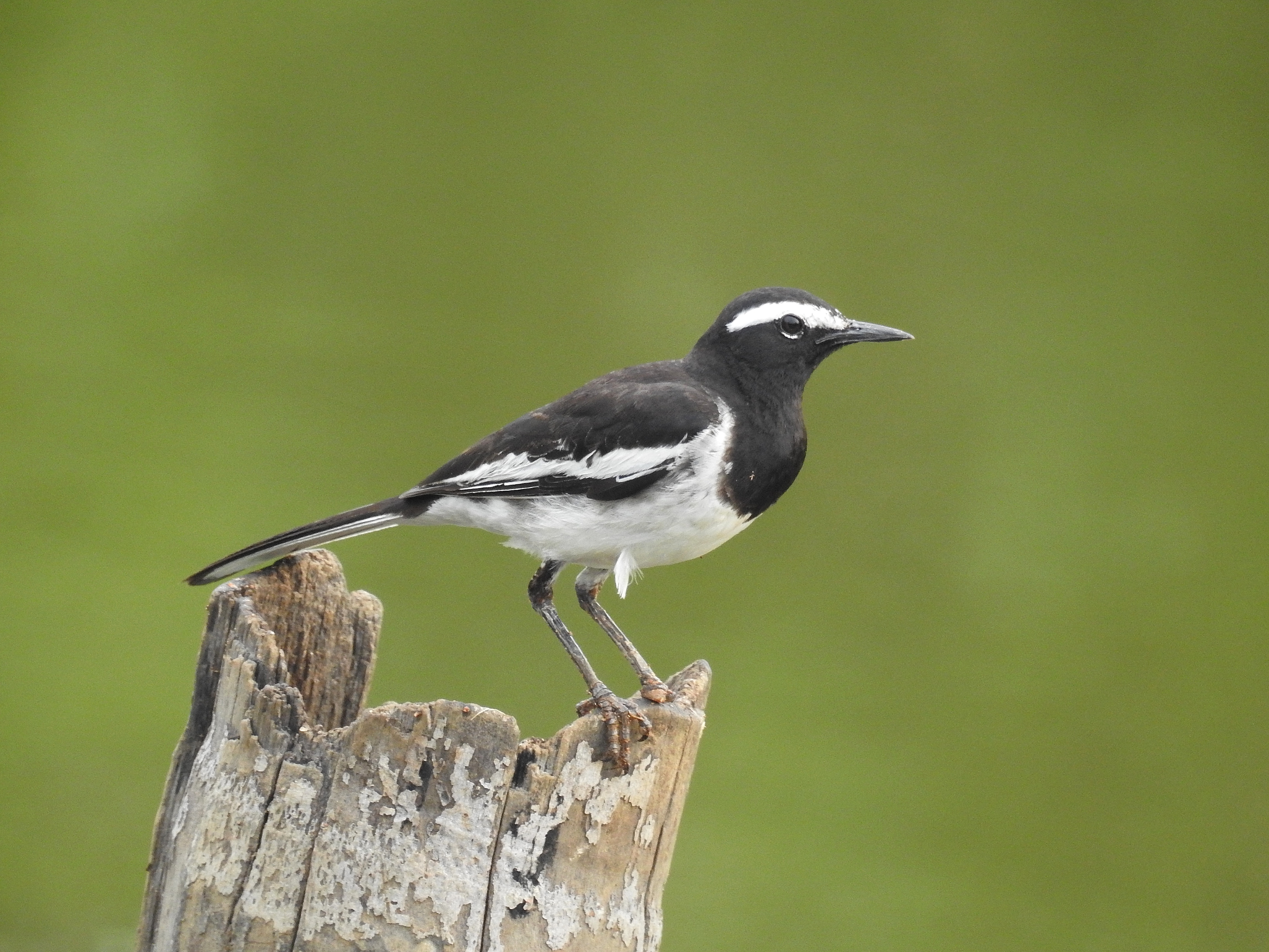 From kannur kerala